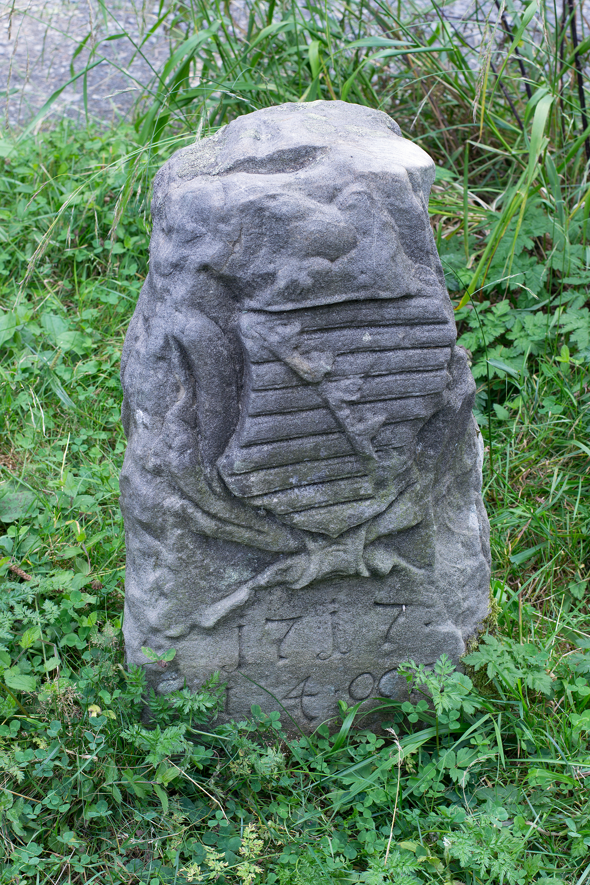 Dreiwappenstein am Kießlich (Dreiherrenstein), Landesgrenzstein Nr. 634 der Landesgrenze Bayern/Thüringen am Schönwappenweg/Rennsteig. Das Foto zeigt die Richtung Thüringen weisende Seite des Grenzsteins.